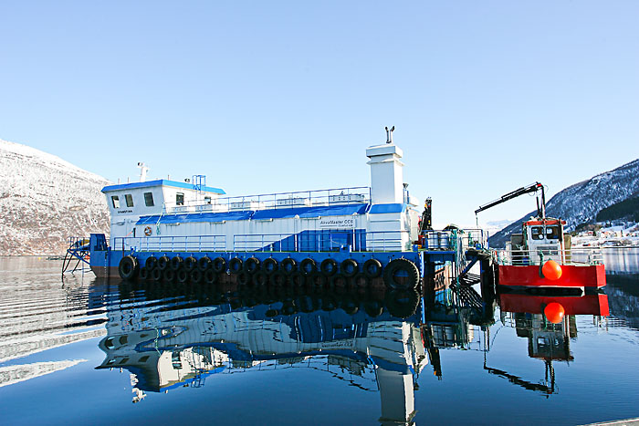 En Akvamaster fôrflåte ved et oppdrettsanlegg i Troms. Google translation: The barges at a fish farm in Troms.